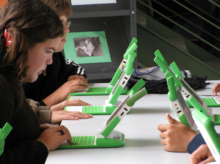 Estudiantes de Secundaria con sus computadoras